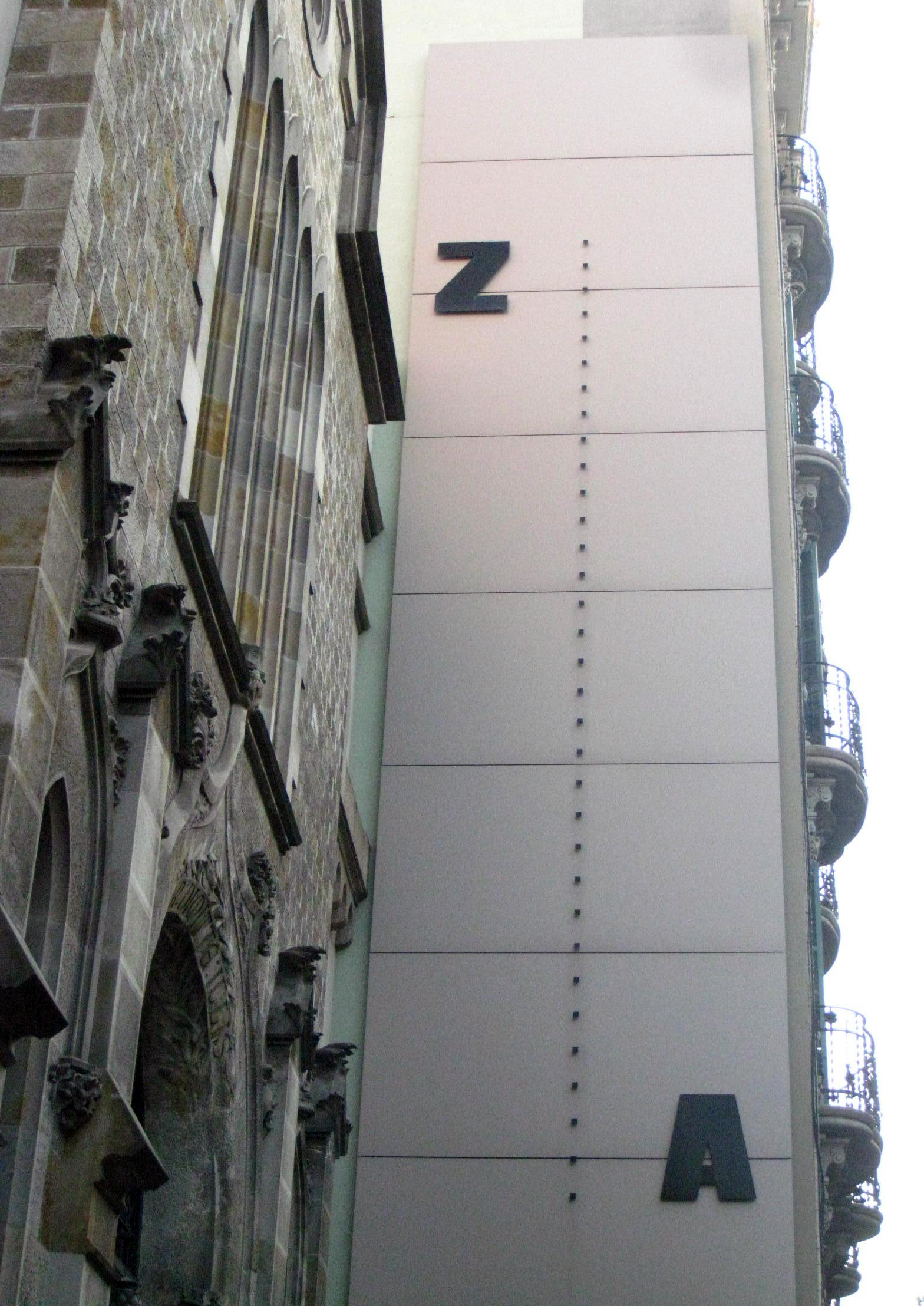 Art poètica i poema visual. C. València, 250-252 (Barcelona)